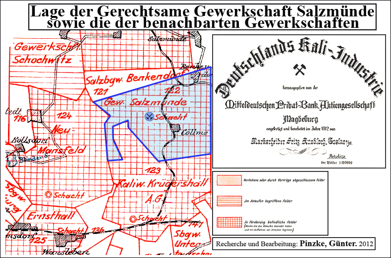 Lage der Berggerechtsame Gewerkschaft Salzmünde.